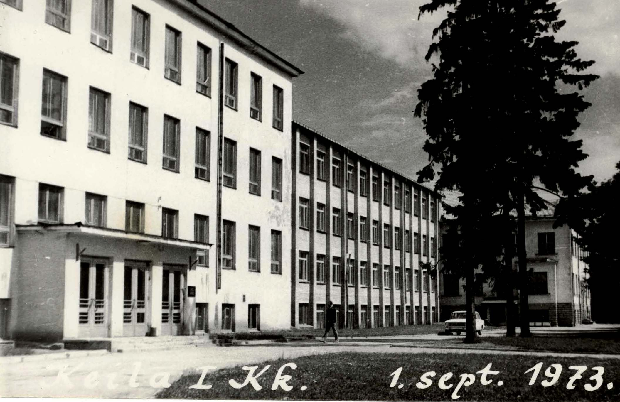 Vana foto Keilast.